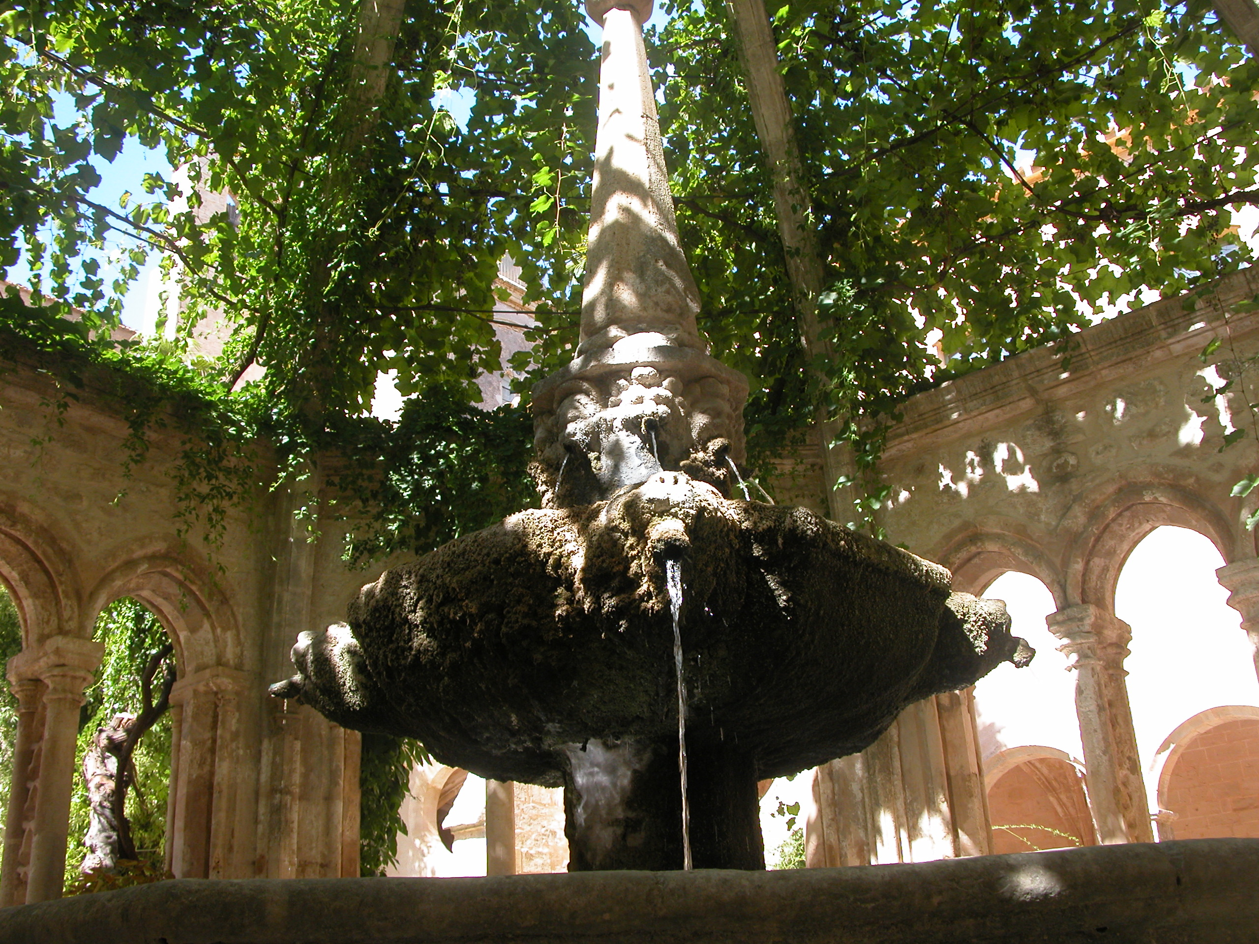 Abbaye de Valmagne - Photo personnelle.